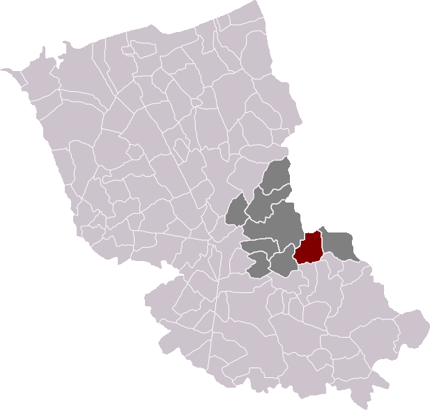 Locatie gemeente Godewaarsvelde in arrondissement Duinkerke. Zelfgemaakt. Location of Godewaersvelde municipality in the arrondissement of Dunkirk. Self made. Localisation de la commune de Godewaersvelde dans l'arrondissement de Dunkerque. Fait moi-même.